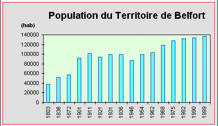 histogramme de l'évolution de la population du Territoire de Belfort de 1803 à 1999. Attention : l'échelle du temps n'est pas linéaire.